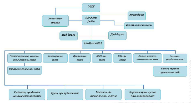 Монгол: Санхүүгийн зохицуулах хорооны бүтэц